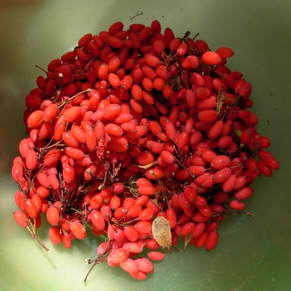 Frutti di Berberis vulgaris pronti per essere usati (ad es per la preparazione di marmellate).